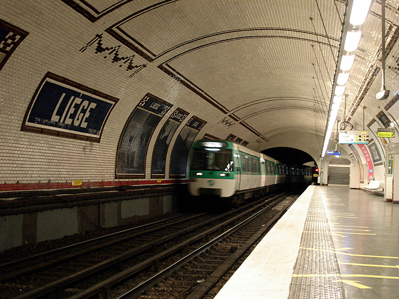 Station Liège, de la ligne 13 du métro de Paris, France.